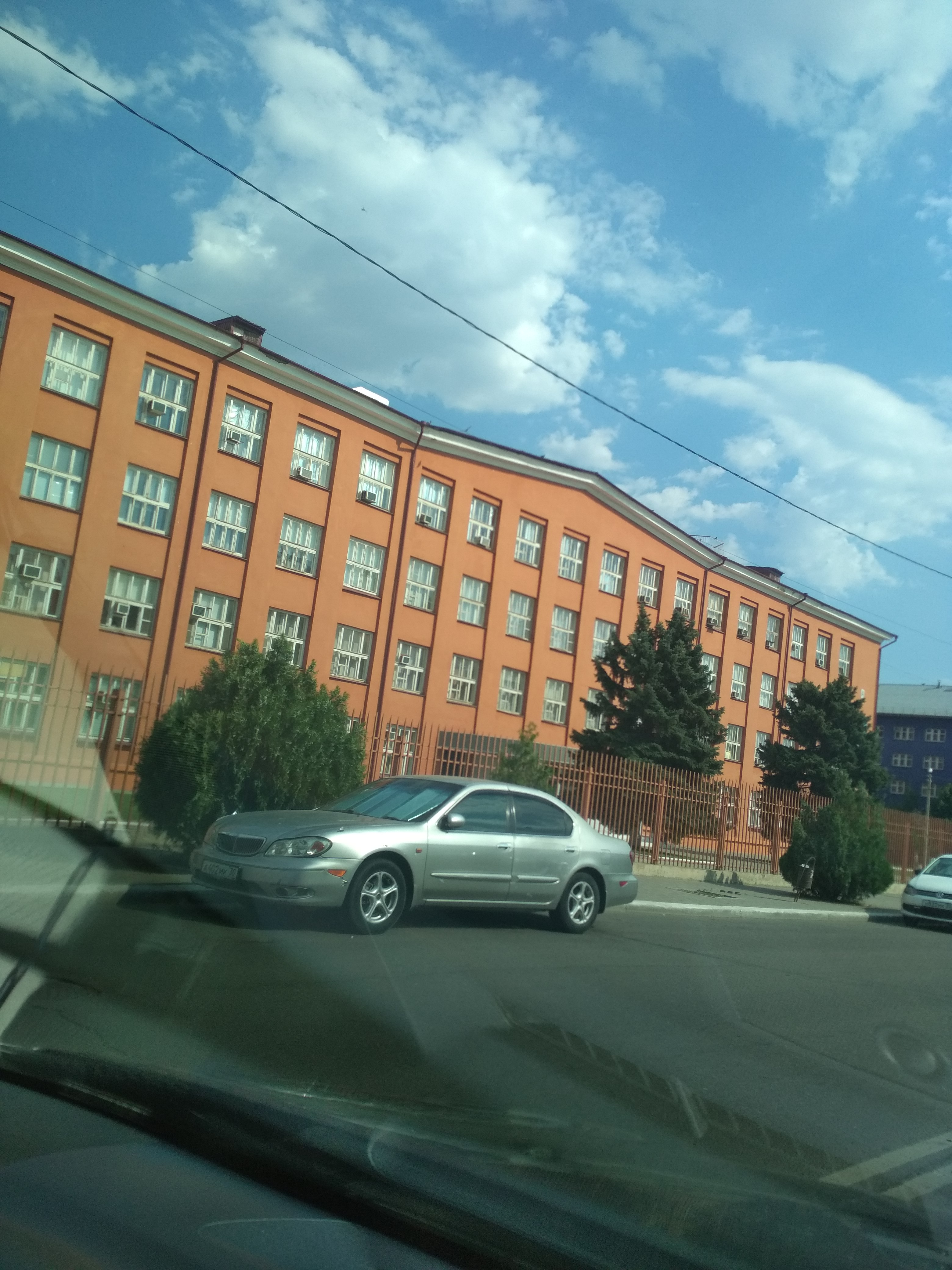 Нохчийн: Астраханский Государственный Технический Университет